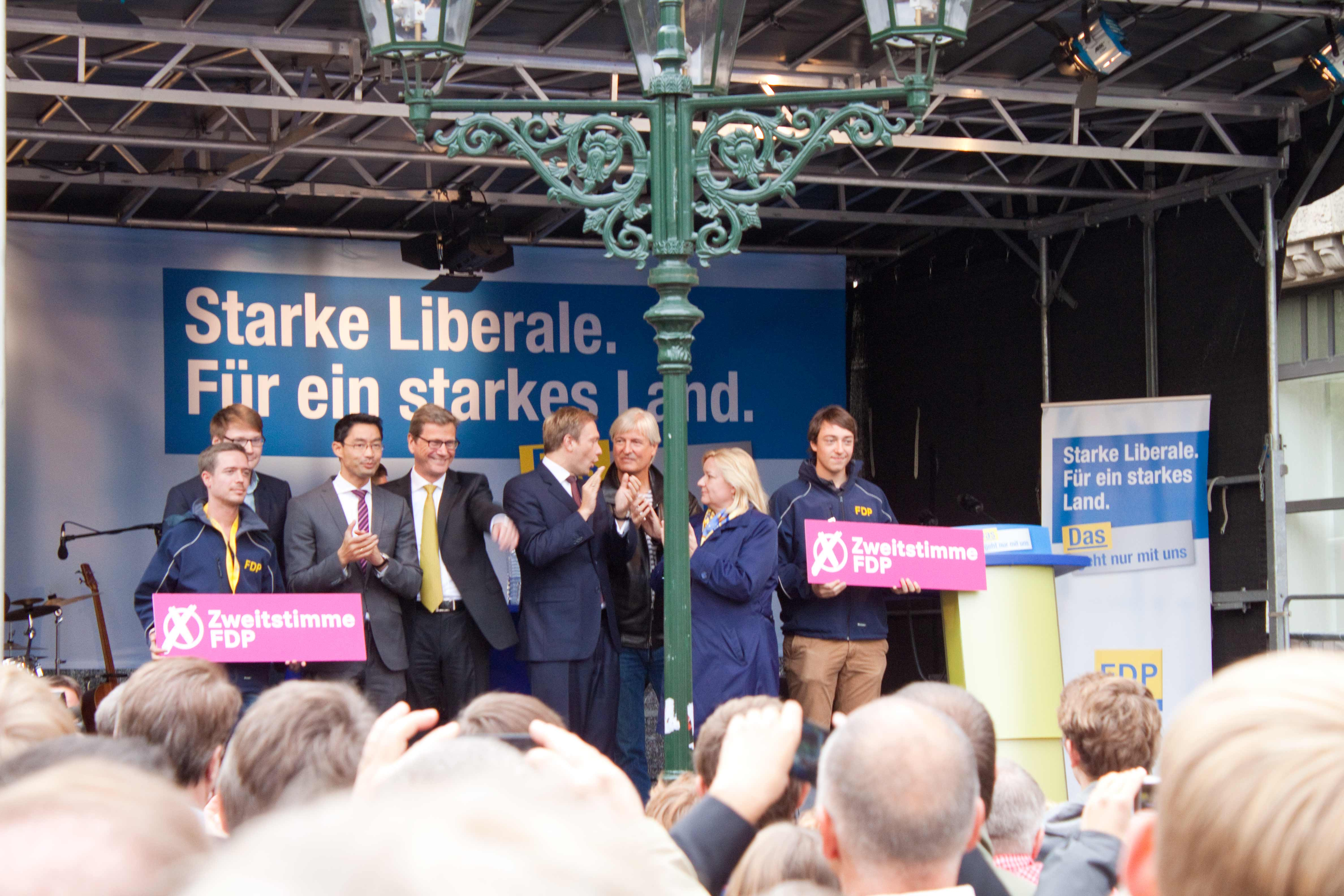 Philipp Rösler, Guido Westerwelle, Christian Lindner, Norbert Hansen, Gisela Piltz. Düsseldorf, Heinrich-Heine-Platz (Carsch-Haus).